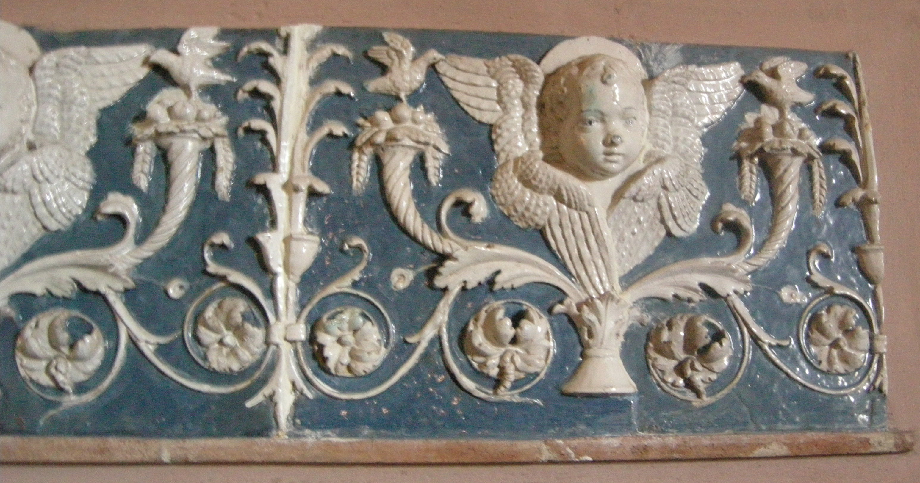 Villa la quiete, salone, giovanni della robbia, fregio con cherubini